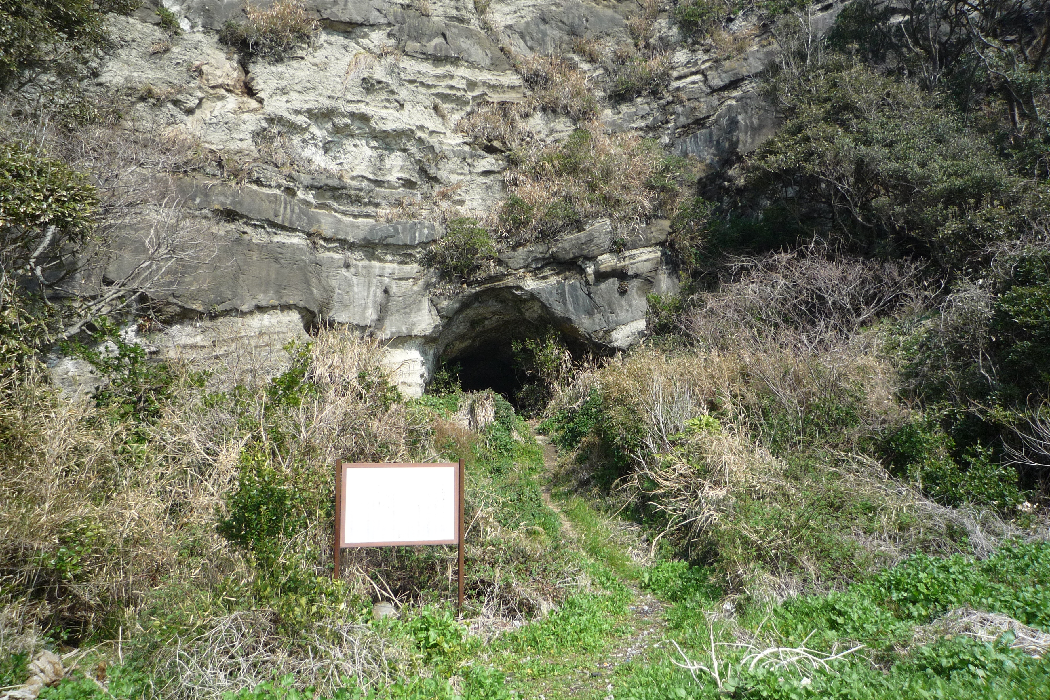 洞窟入り口の画像。